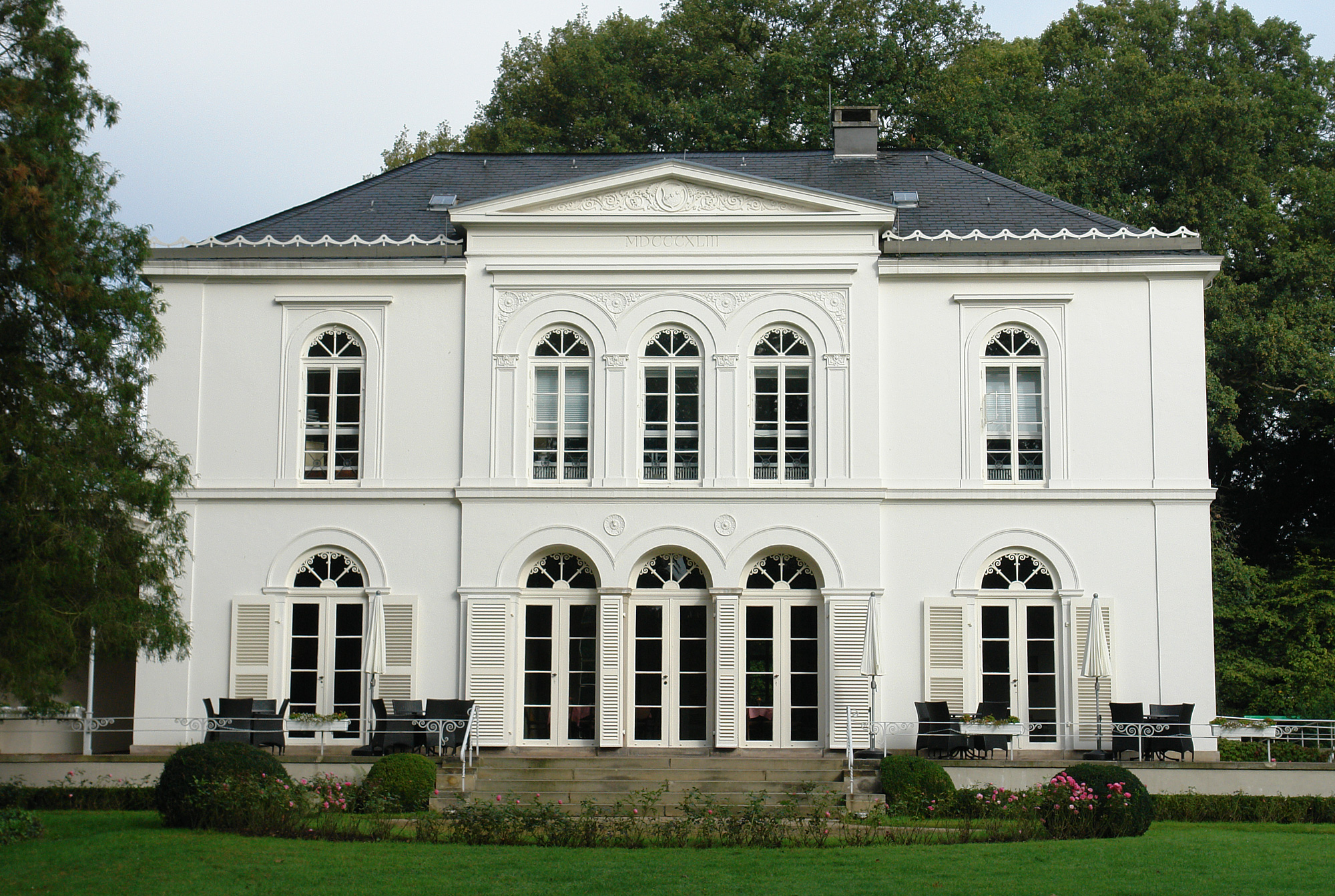 Landhaus Caesar-Ichon in Bremen, Oberneulander Landstraße 70.Das abgebildete Objekt ist ein geschütztes Kulturdenkmal in der Freien Hansestadt Bremen, mit der Nr. 0948,T001 beim Landesamt für Denkmalpflege registriert.